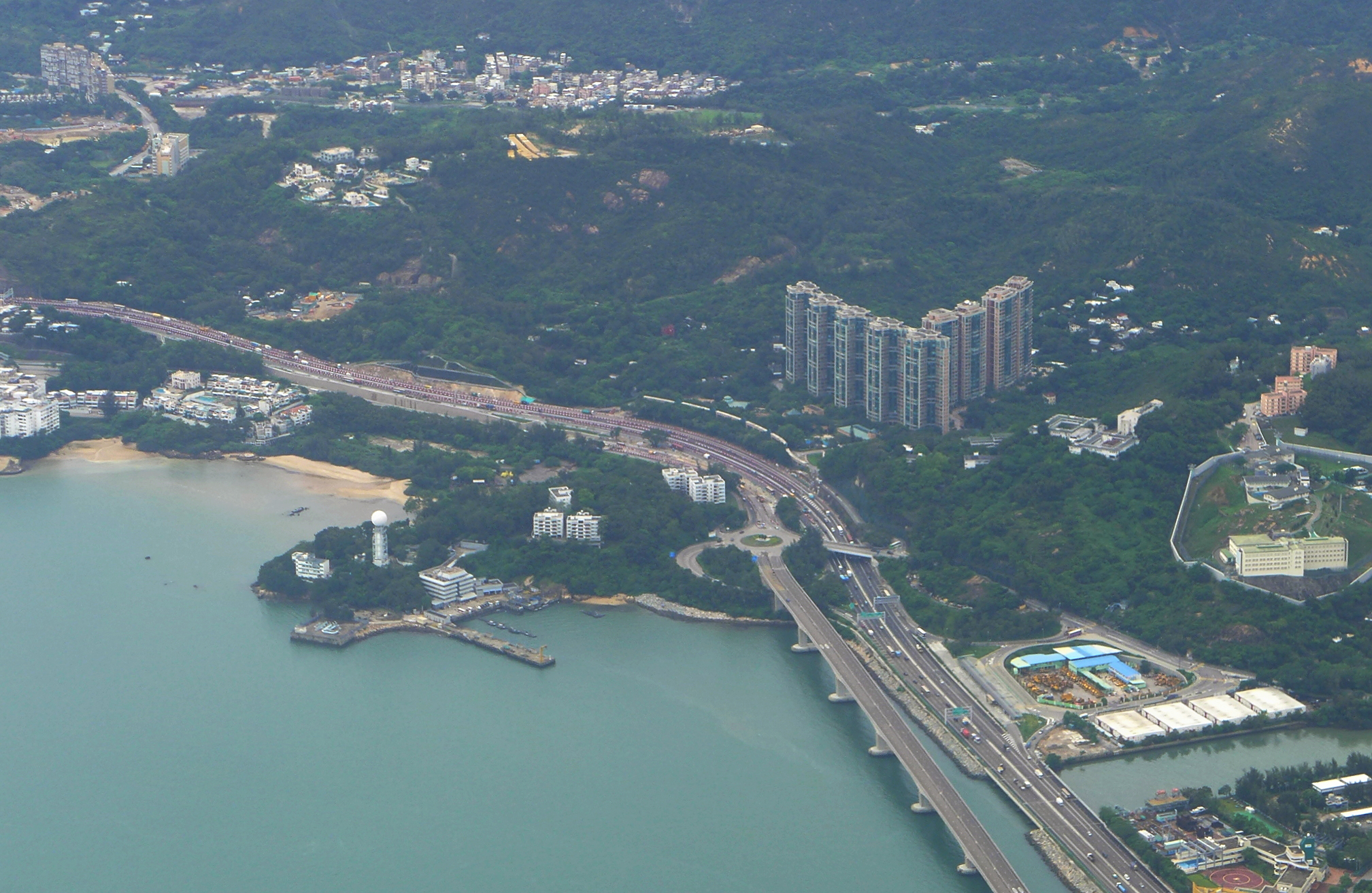 Siu Lam Oveview